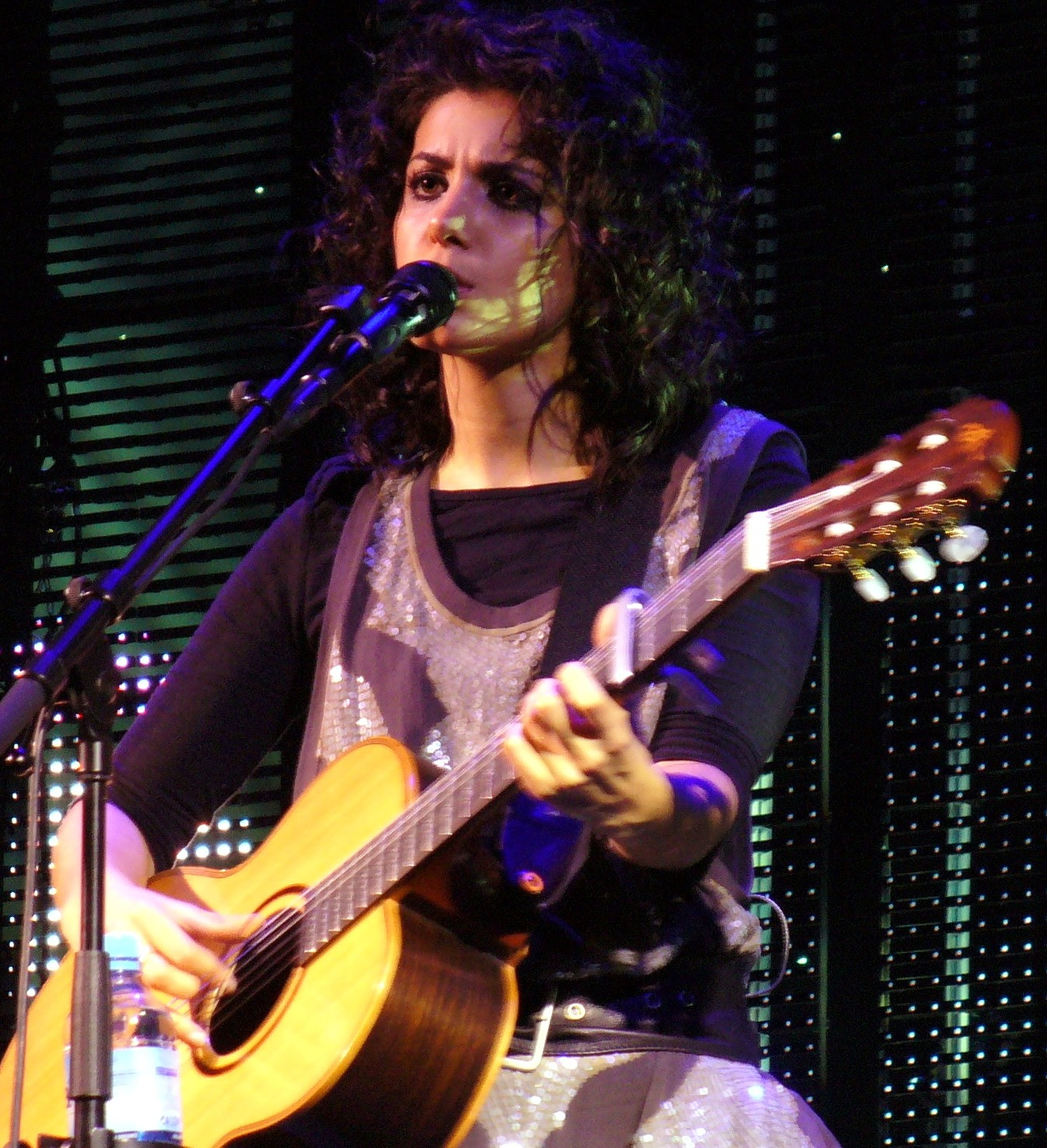 Katie Melua in Milan